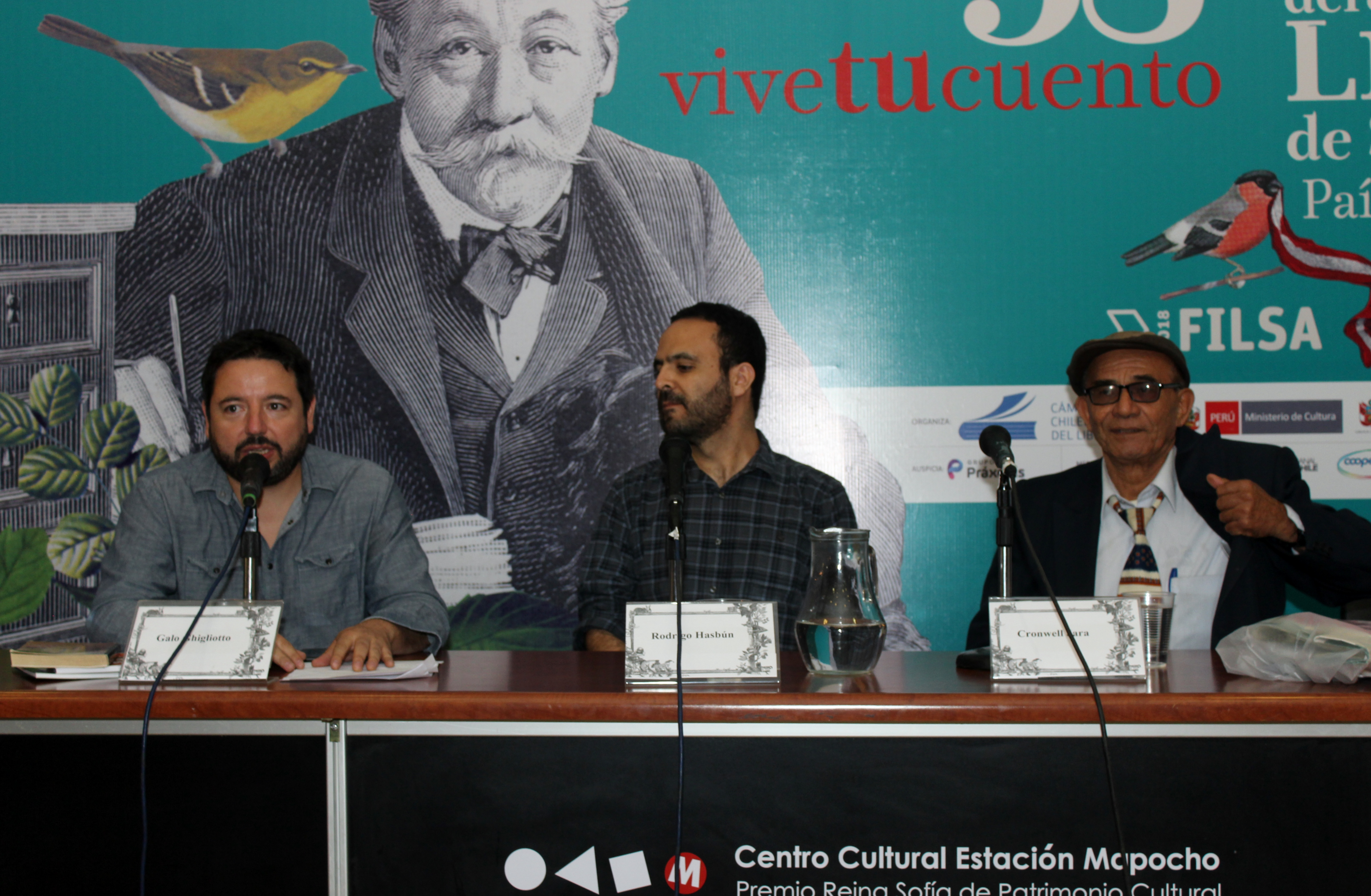 Los escritores Galo Ghigliotto (Chile) Rodrigo Hasbún (Bolivia) y Cronwell Jara (Perú) durante el conversatorio Las raras formas narrativas en la Feria Internacional del Libro de Santiago 2018.